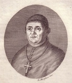 Giuseppe Capocasale (1754-1828), abate, docente e filosofo italiano